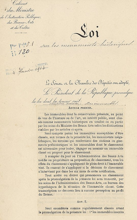 Cette loi instaure un double niveau de protection avec le classement au titre des Monuments historiques et l’inscription sur l’inventaire supplémentaire.